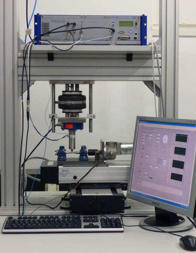 Anwendung des PP an Rundproben